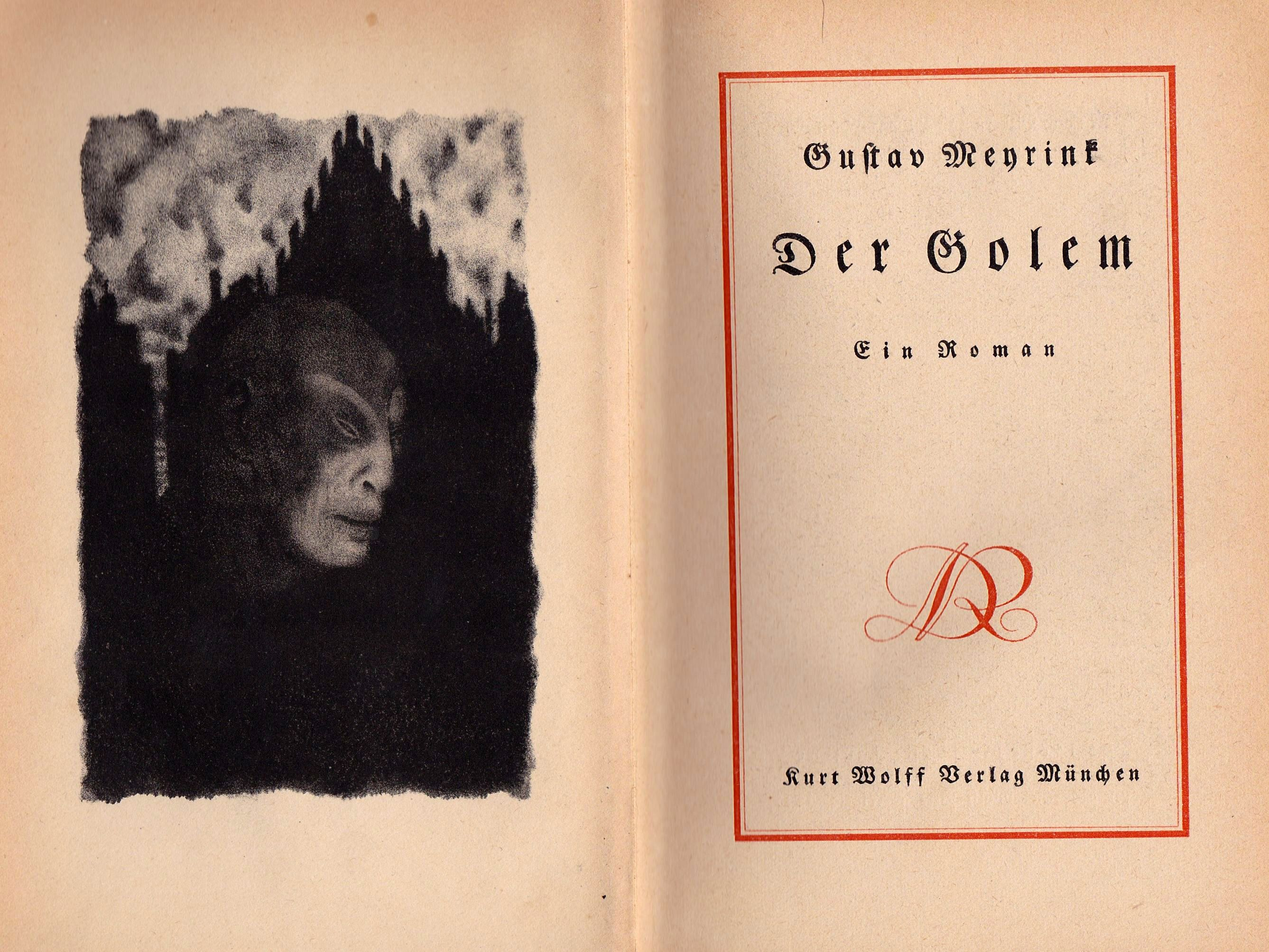 Gustav Meyrink: Der Golem, Titelblatt von 1915